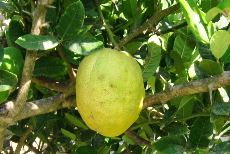 אתרוג תימני רישיון נוצר על ידי משתמש:Daniel Ventura